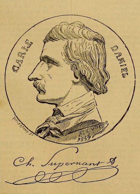 Portrait du chansonnier français François Supernant.